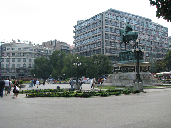 Republique square in Belgrade, Serbia/La Place de la République (Republike trg) à Belgrade, Serbie